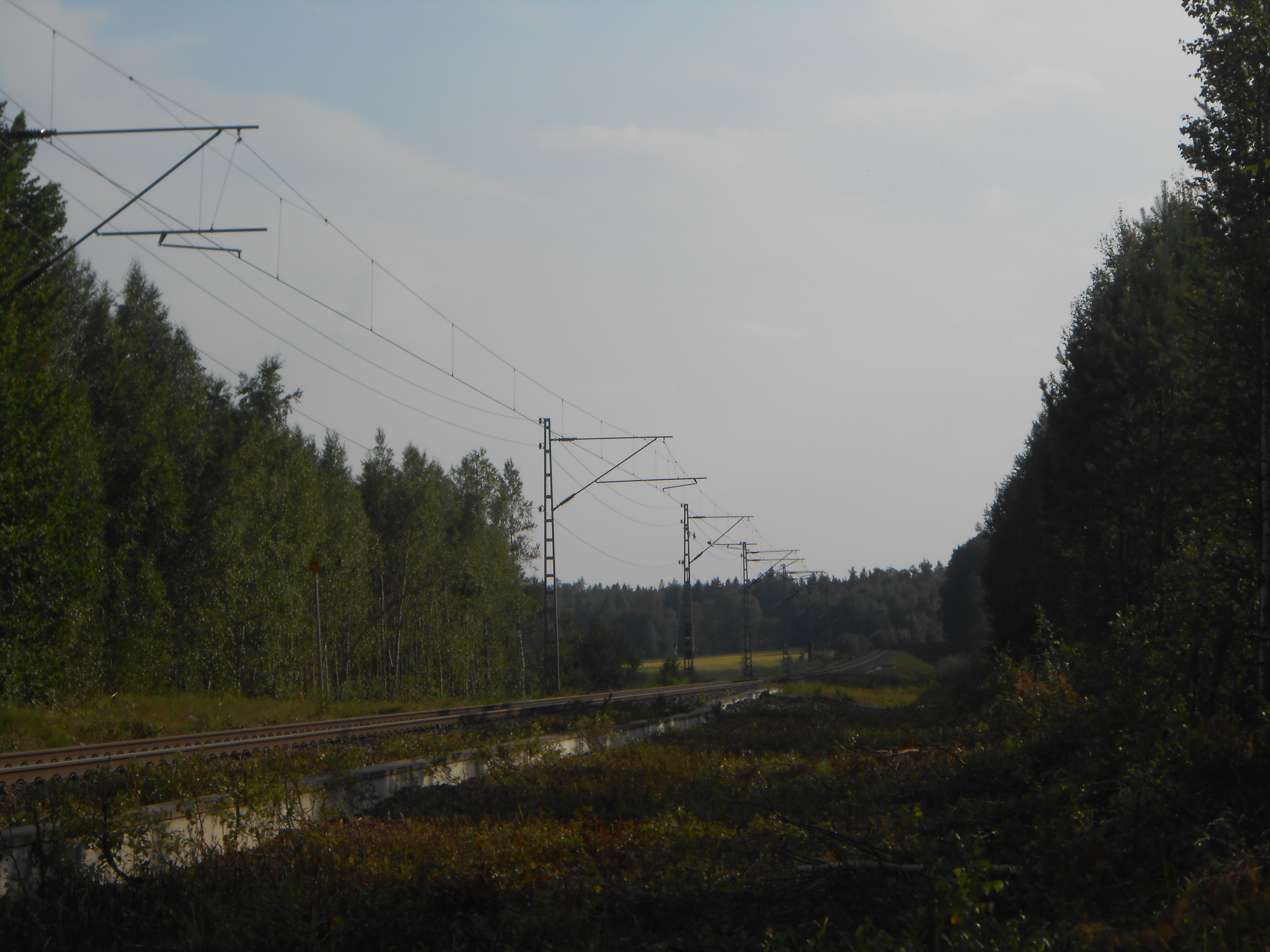 Rantarataa Tähtelän asemalta itään päin kesällä 2016.